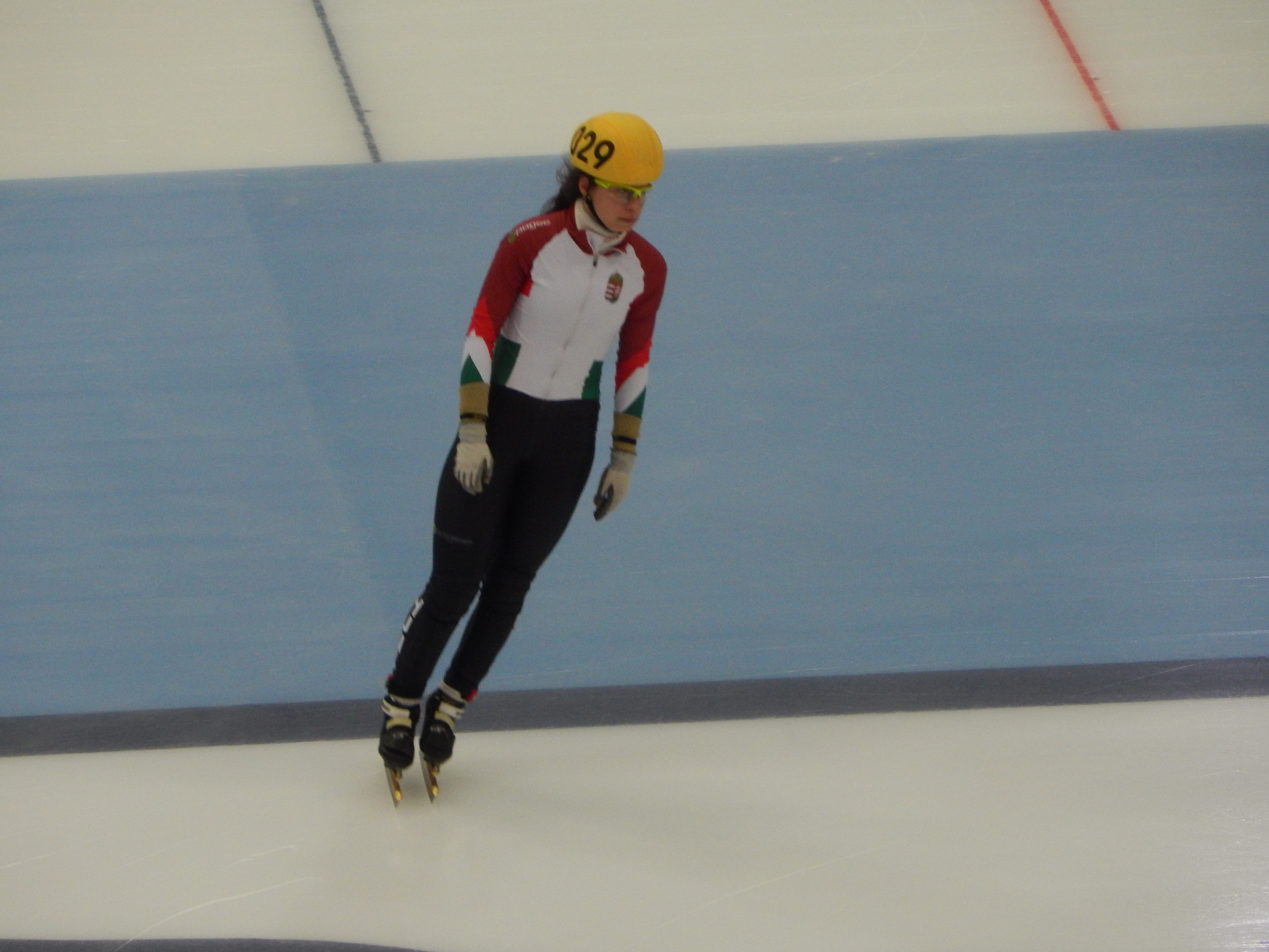 Чемпионат мира по шорт-треку 2015 в Москве Квалификационный раунд, 1 забег, 1000 м, Женщины Петра Яшапати